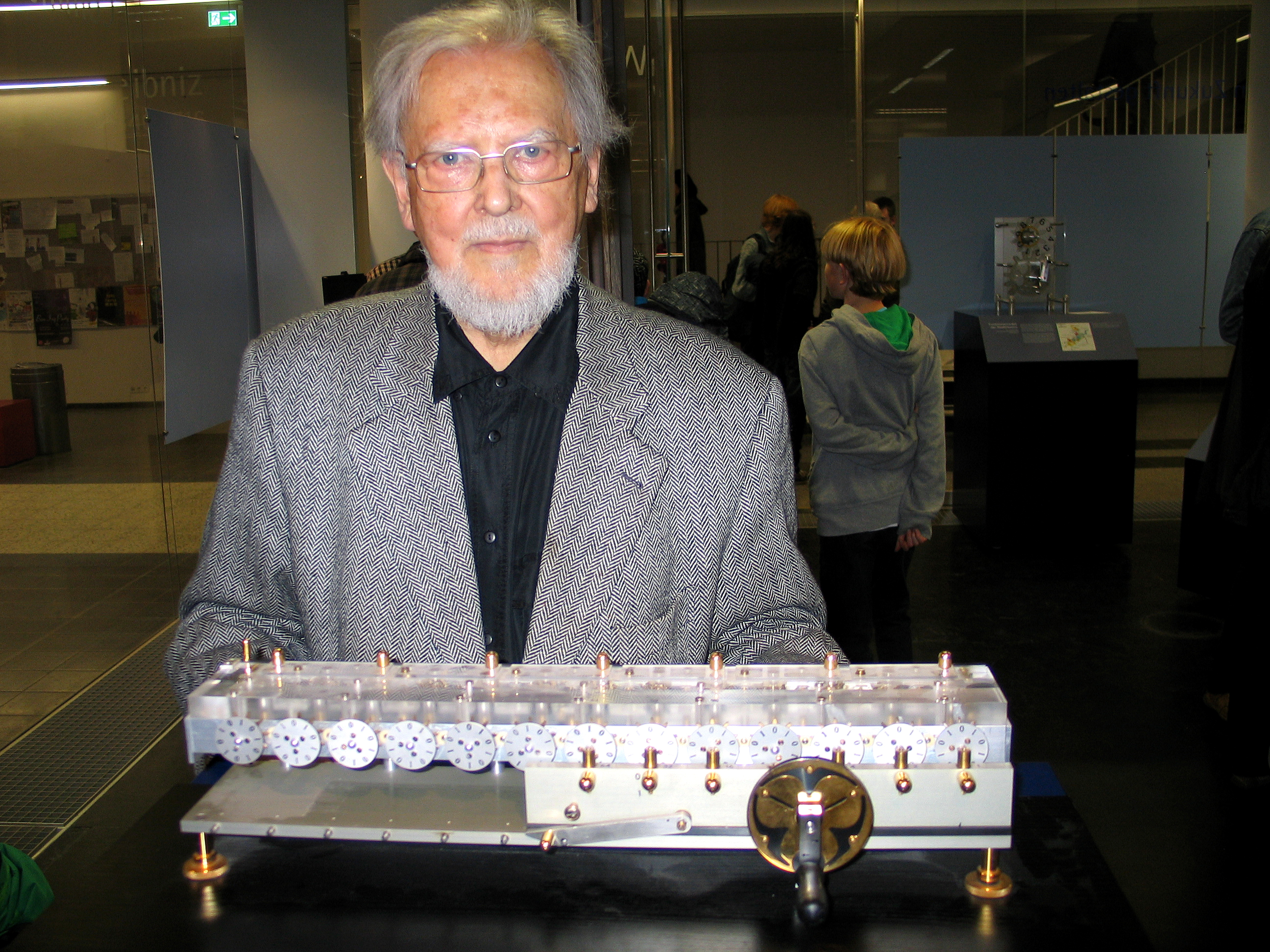 Professor Erwin Stein hinter der Binären Vier-Spezies-Getriebemaschine nach Gottfried Wilhelm Leibniz, hier in einem der Schauhäuser in der Passage im Erdgeschoss des Hauptgebäudes der Leibniz Universität Hannover während der Nacht, die Wissen schafft 2012 ...